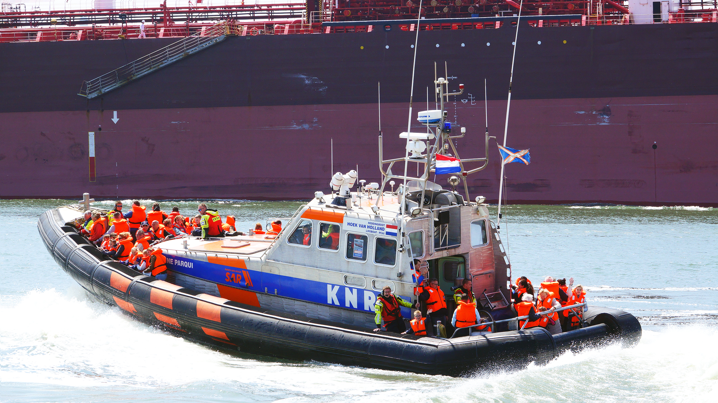 Opendag KNRM Hoek van Holland 2017